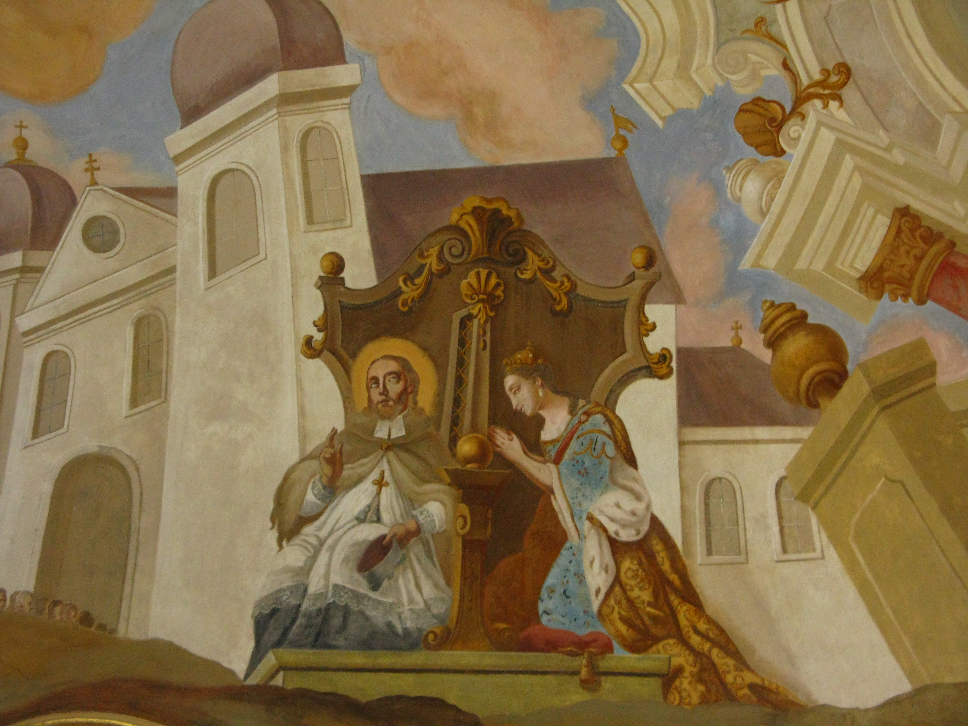 Wallfahrtskirche Maria Stern in Neukirchen am Simsee, Landkreis Rosenheim; Ausschnitt es Deckenfreskos, von Josef Adam Mölkh, die Frau von König Wenzel beichtet bei Nepomuk, dem Scutzheiligen des Beichtgeheimnisses.